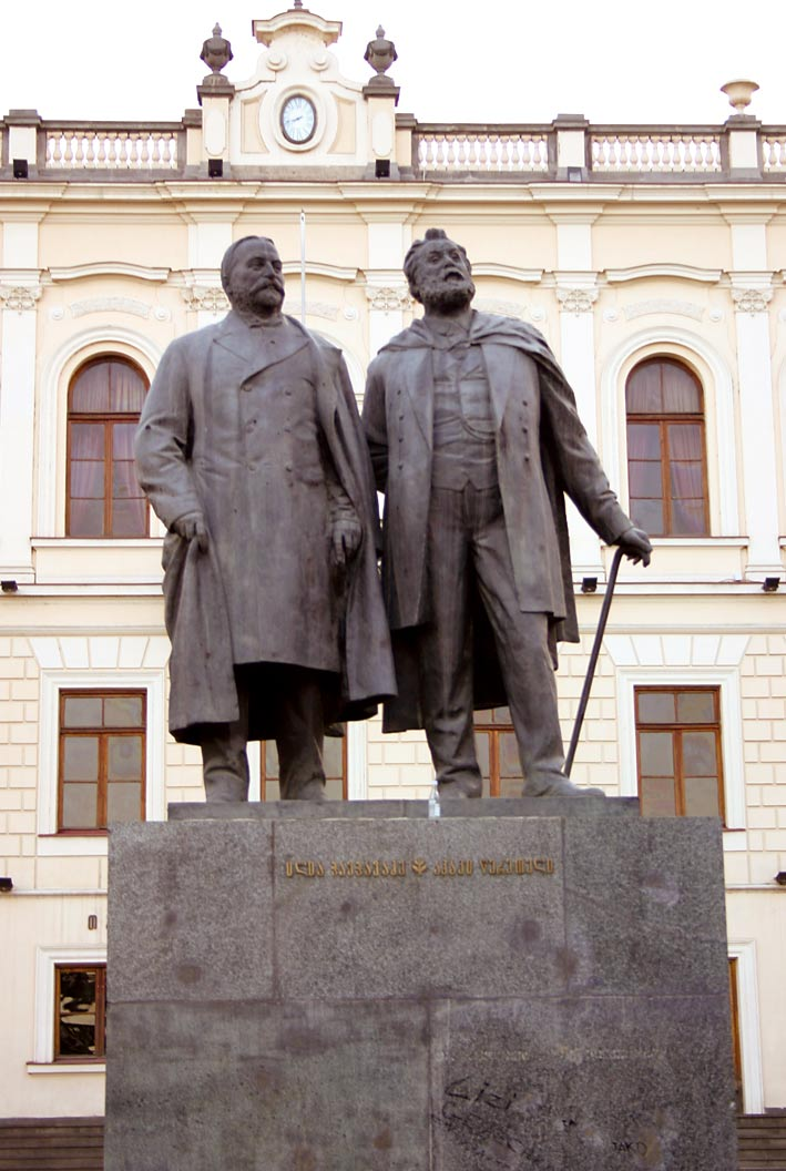 Ilia Tschawtschawadse (links) und Akaki Zereteli (rechts) in Tiflis (vor der Universität Tiflis)